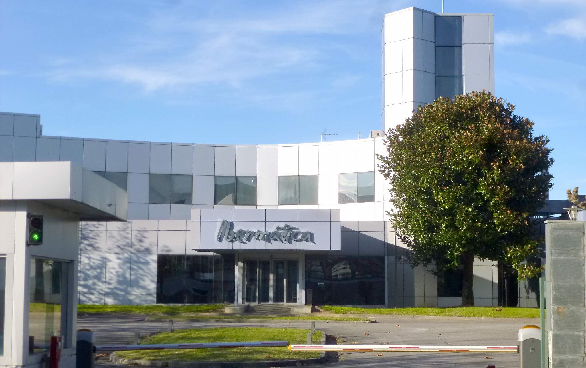 San Sebastián - Parque Científico y Tecnológico de Gipuzkoa - Ibermática